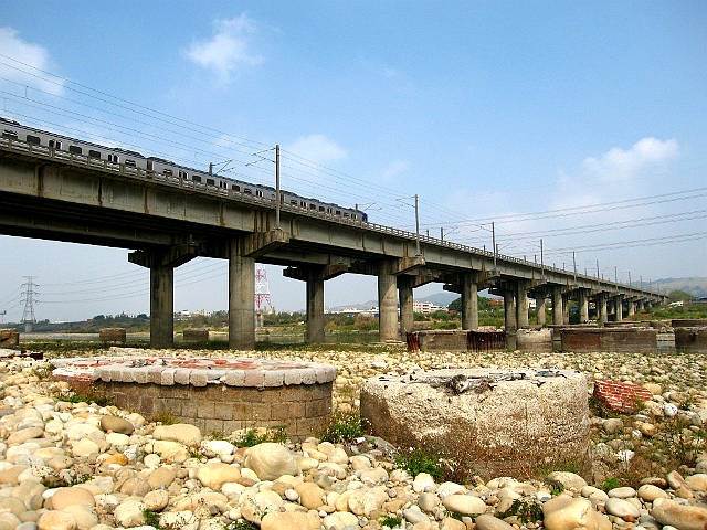 台鐵第三代大肚溪橋(1988) was filmed by TDCKW on 20070218